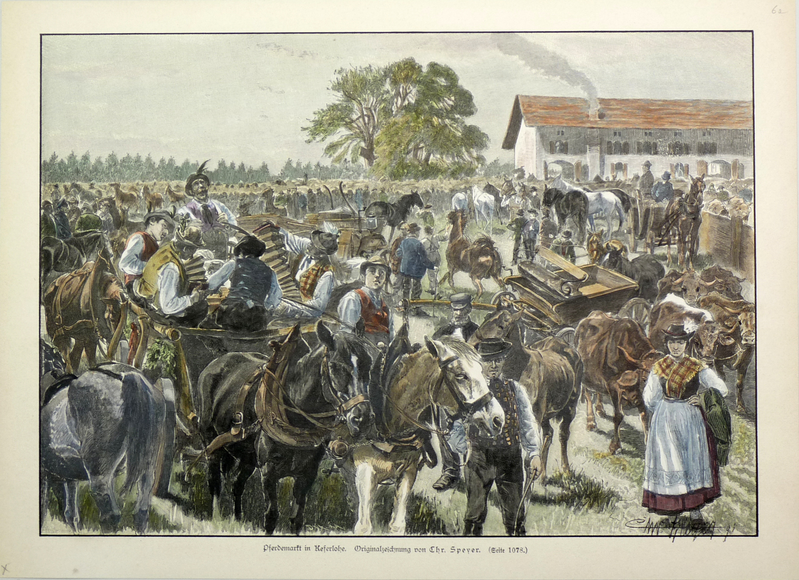 Pferdemarkt in Keferloh, kolorierter Holzschnitt nach einer Zeichnung von Christian Speyer um 1891.